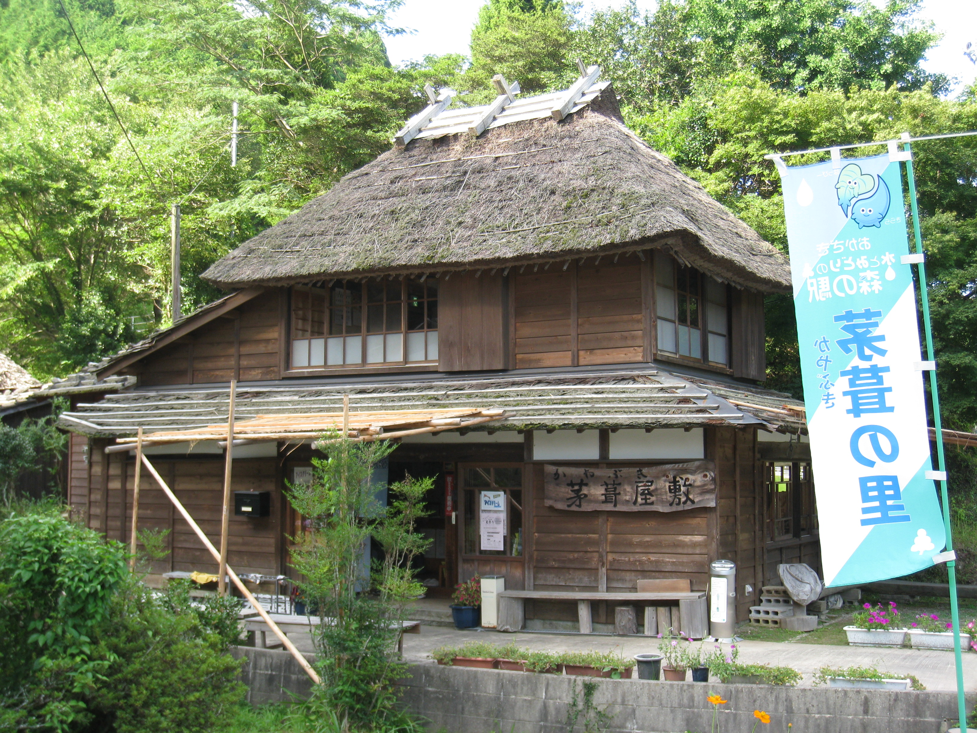 千万町茅葺屋敷の写真その1